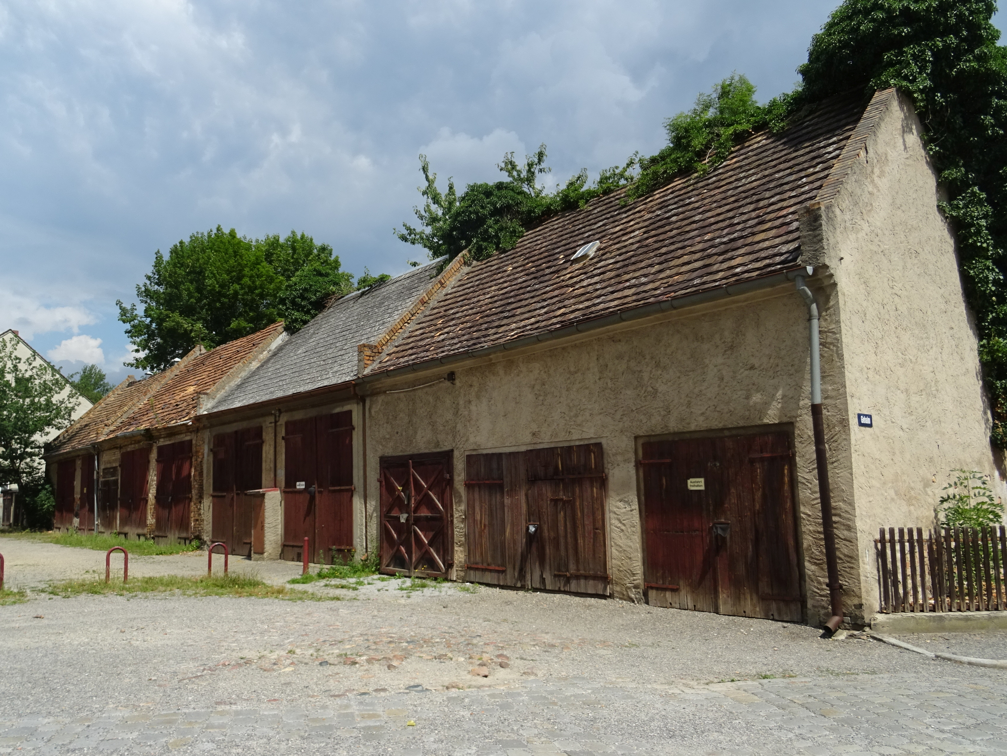 Bad Muskau, denkmalgeschützter Scheunenkomplex, Gehalm 5 / 7 /9 /11 (ungerade Nummern)